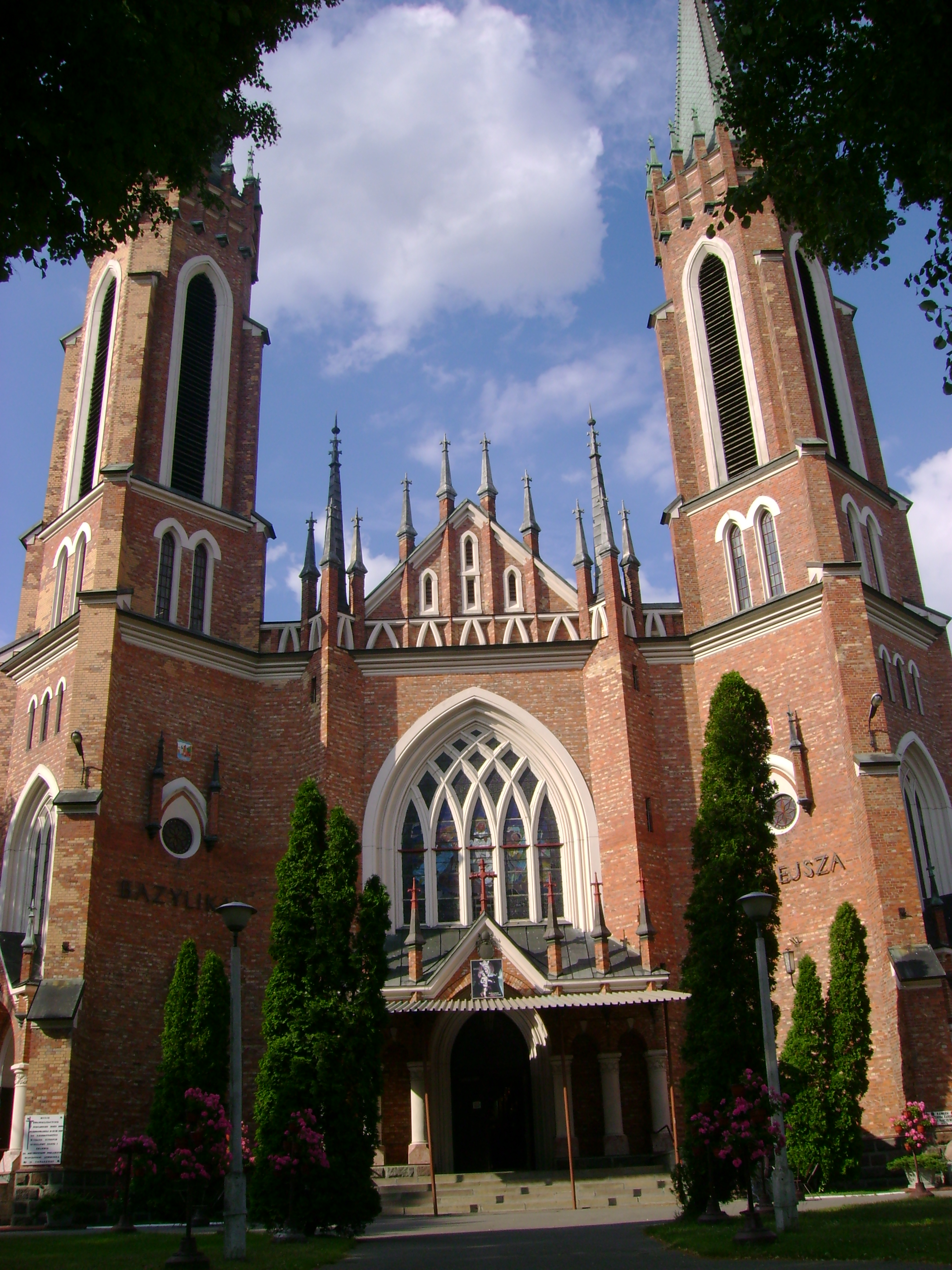 Bazylika Mniejsza w Parczewie